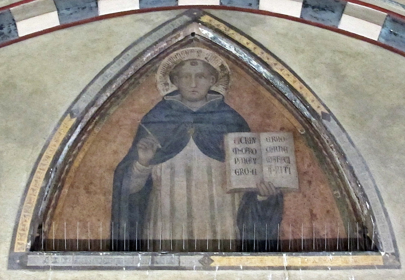 Chiostro dei morti, braccio sud, affresco con tommaso d'aquino di Stefano fiorentino 2